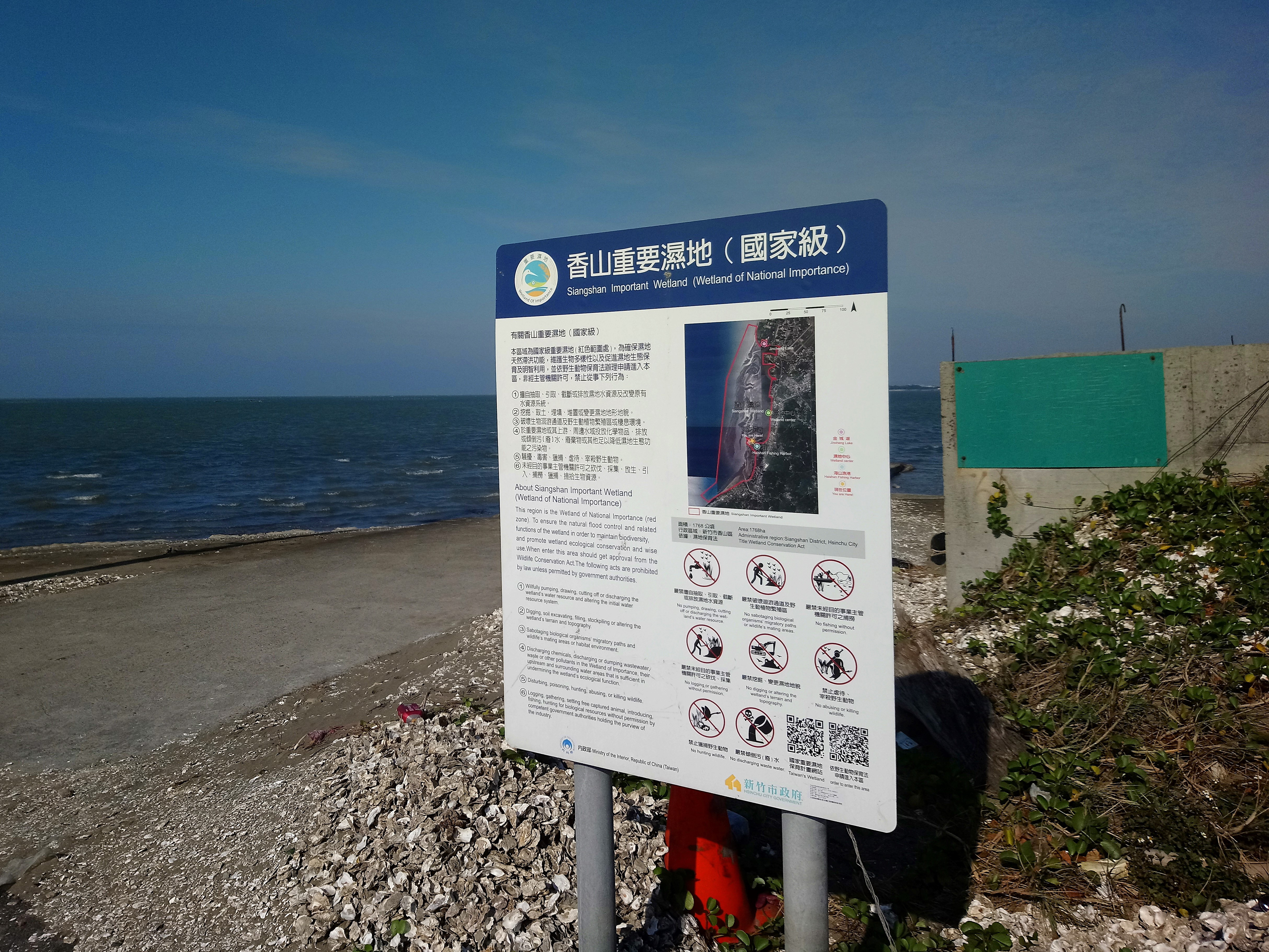 海山漁港內香山濕地禁止行為告示牌，中華民國內政部、新竹市政府設置。